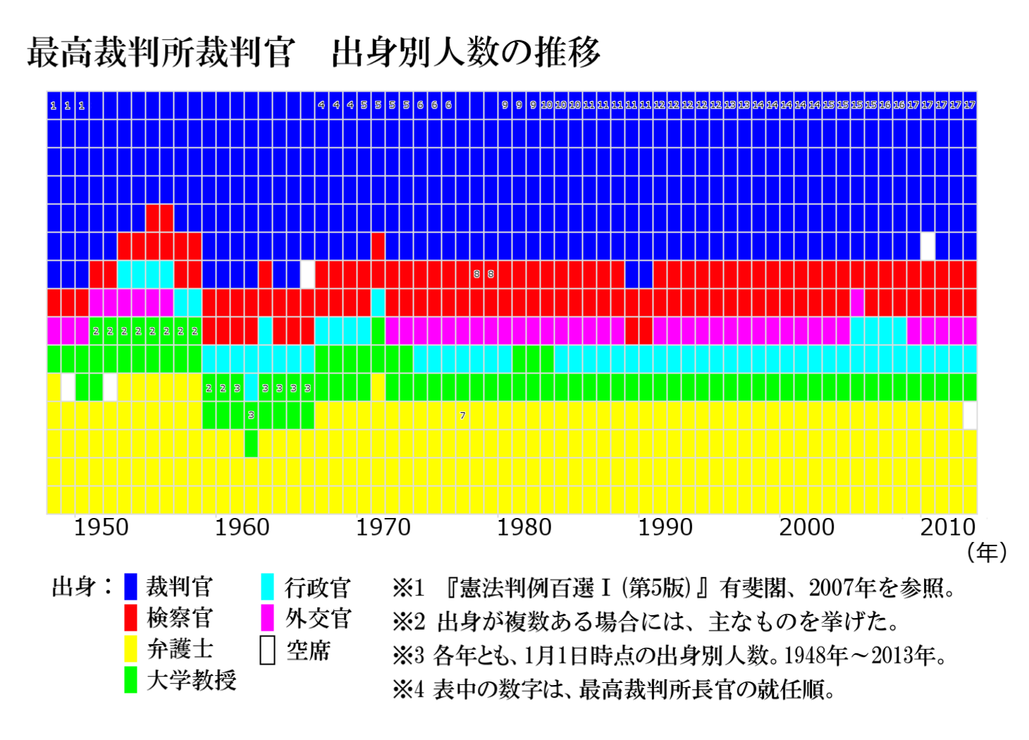 最高裁中裁判官的出身別之人數推移表.